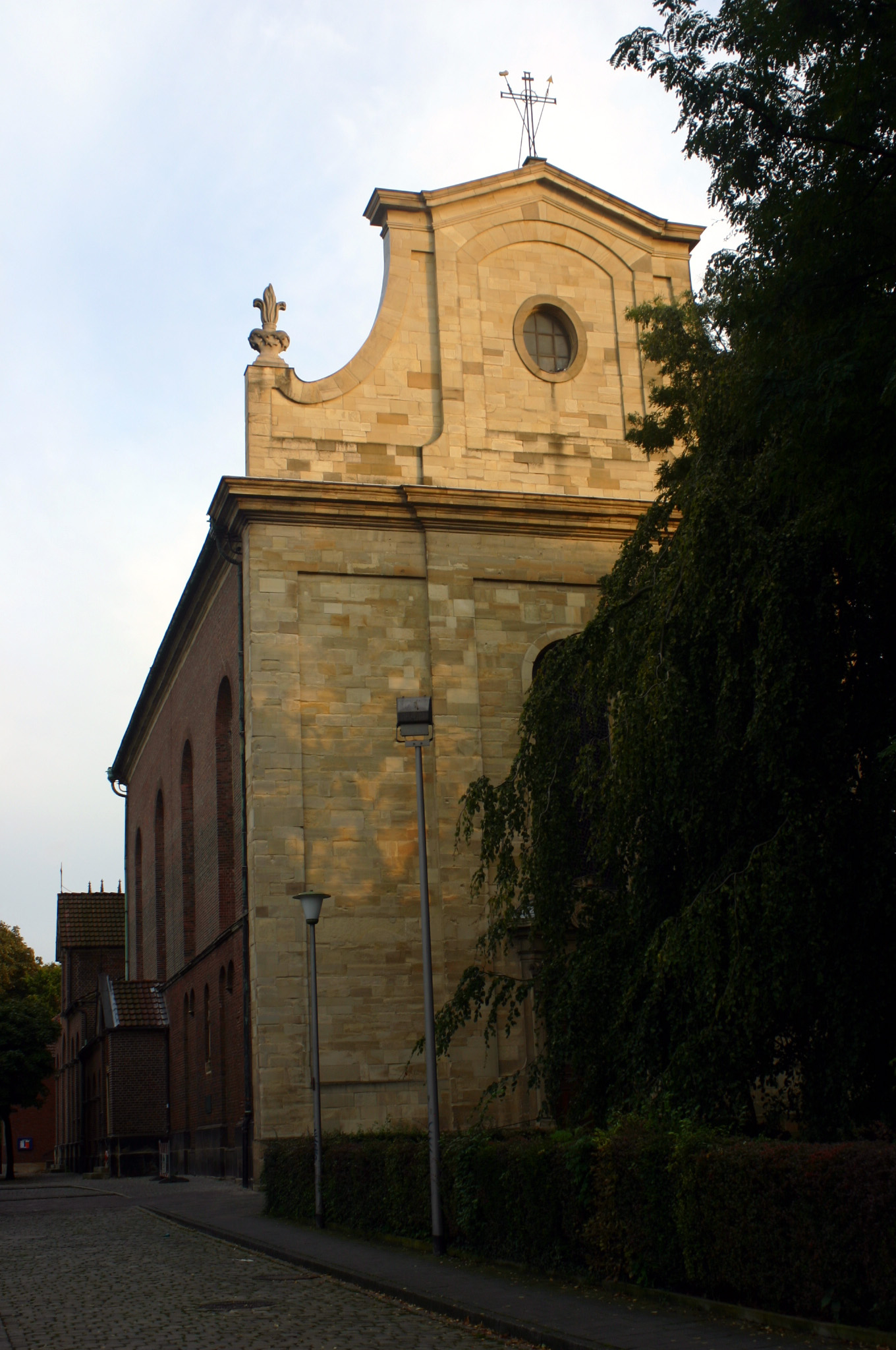 Münster, Germany, Agidiikirche